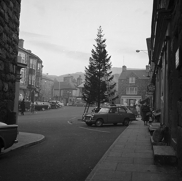 Teitl Cymraeg/Welsh title: Codi coeden Nadolig yn Nolgellau Ffotograffydd/Photographer: Geoff Charles (1909-2002) Dyddiad/Date: 1/12/1961 Cyfrwng/Medium: Negydd ffilm / Film negative Cyfeiriad/Reference: (gch25414) Rhif cofnod / Record no.: 3471091 Rhagor o wybodaeth am gasgliad Geoff Charles yn Llyfrgell Genedlaethol Cymru More information about the Geoff Charles Collection at the National Library of Wales Mae ffotograffau Geoff Charles hefyd yn rhan o Broject Europeana Libraries Geoff Charles' photographs also form part of the Europeana Libraries Project